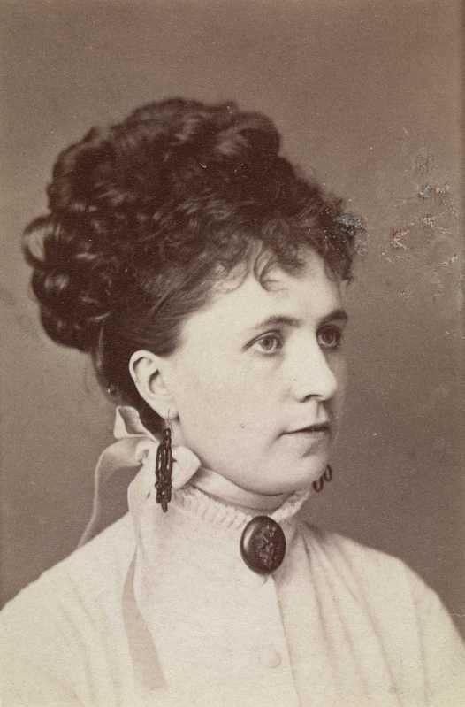 Gurli Åberg, portrett, kvinne, sangerinne, brystbilde, halvprofil.